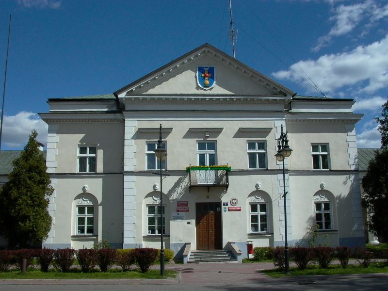 Klasycystyczny gmach ratusza w Górze Kalwarii (classicistic town hall in Góra Kalwaria).